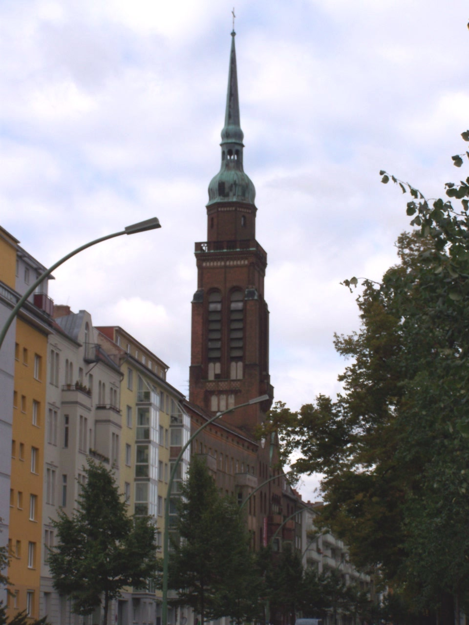 Berlin, Segenskirche Prenzlauer Berg (2008-09-20)